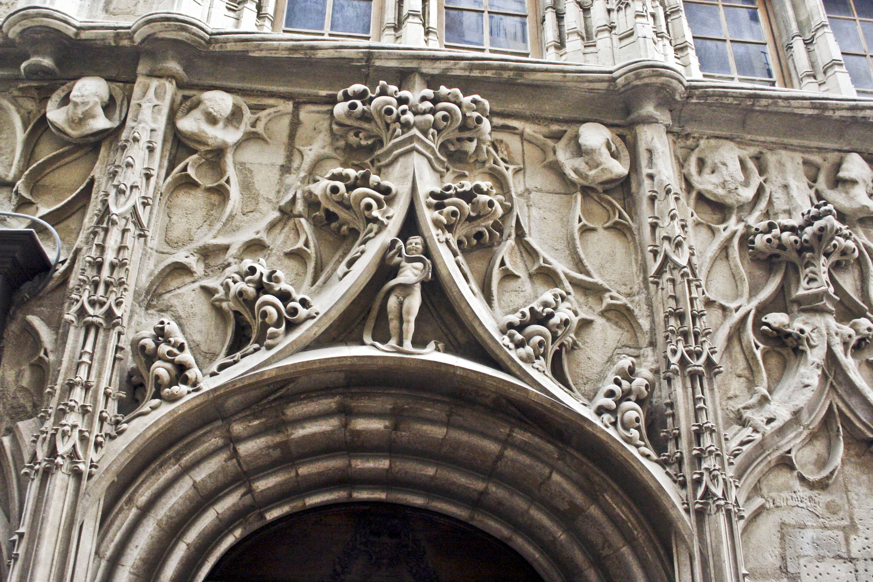 Maison des Têtes, Valence, Drôme, France : détail de la façade.